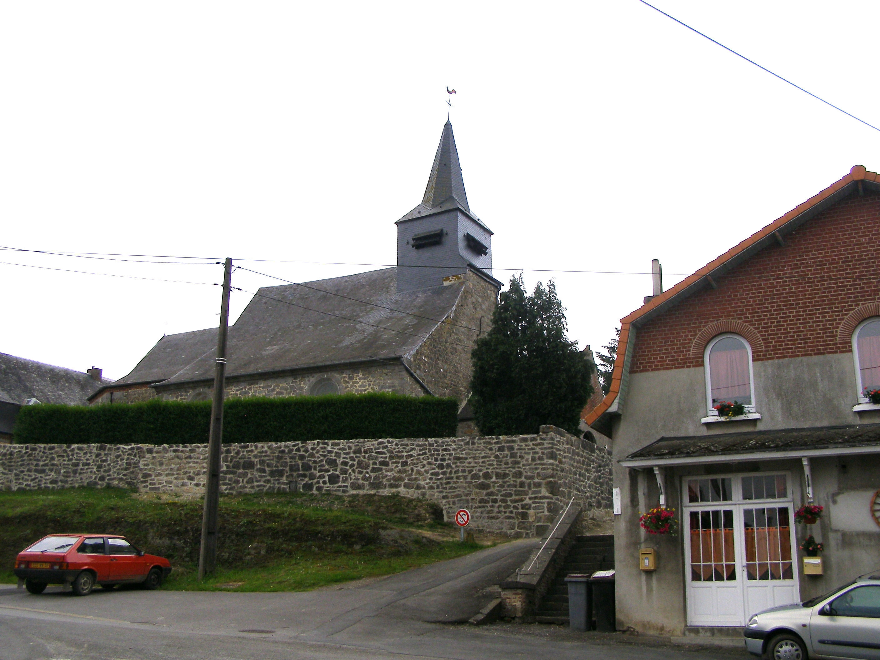 Église.